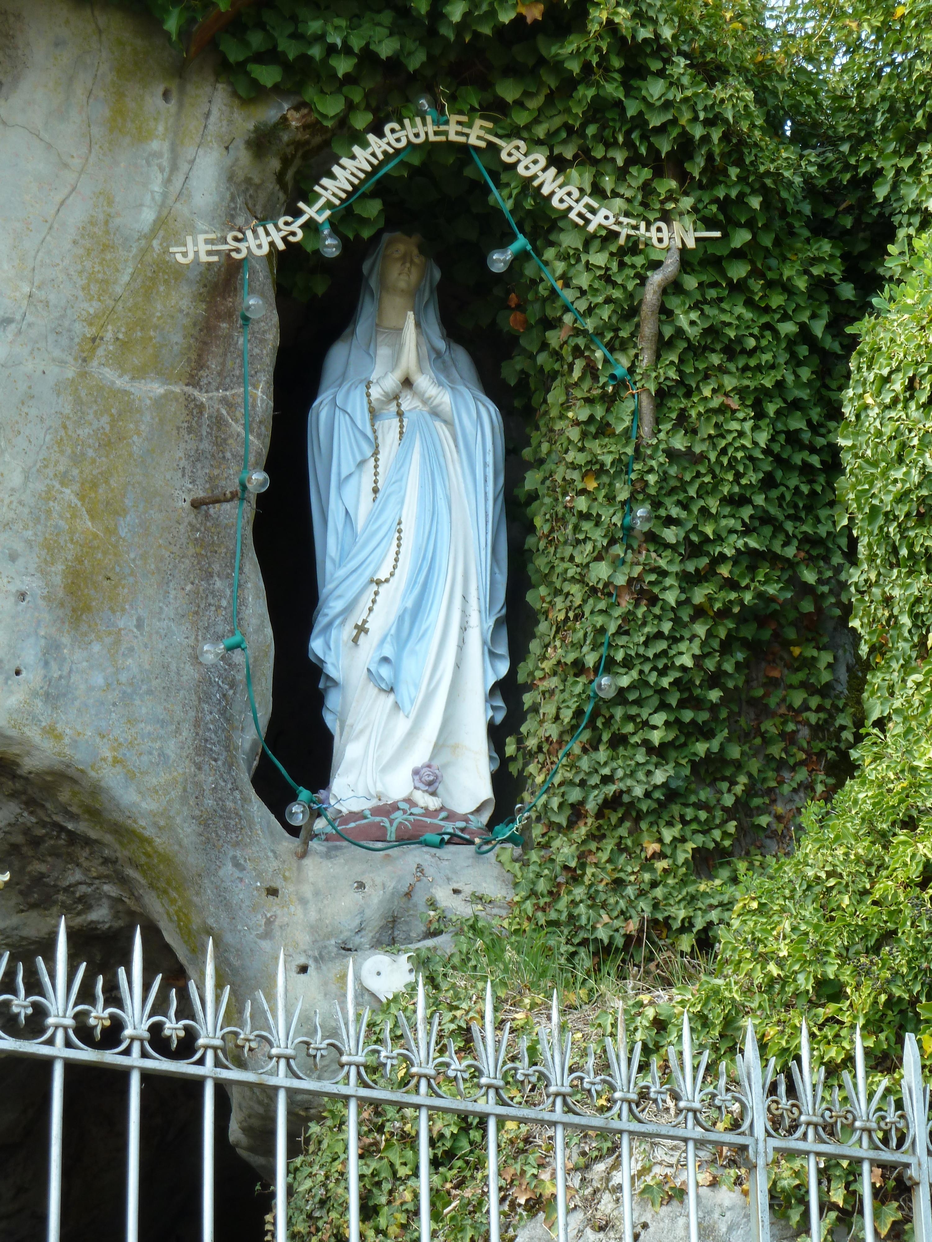 Bruley replique de la grotte de Lourdes statue. "JE SUIS L IMMACULEE CONCEPTION"